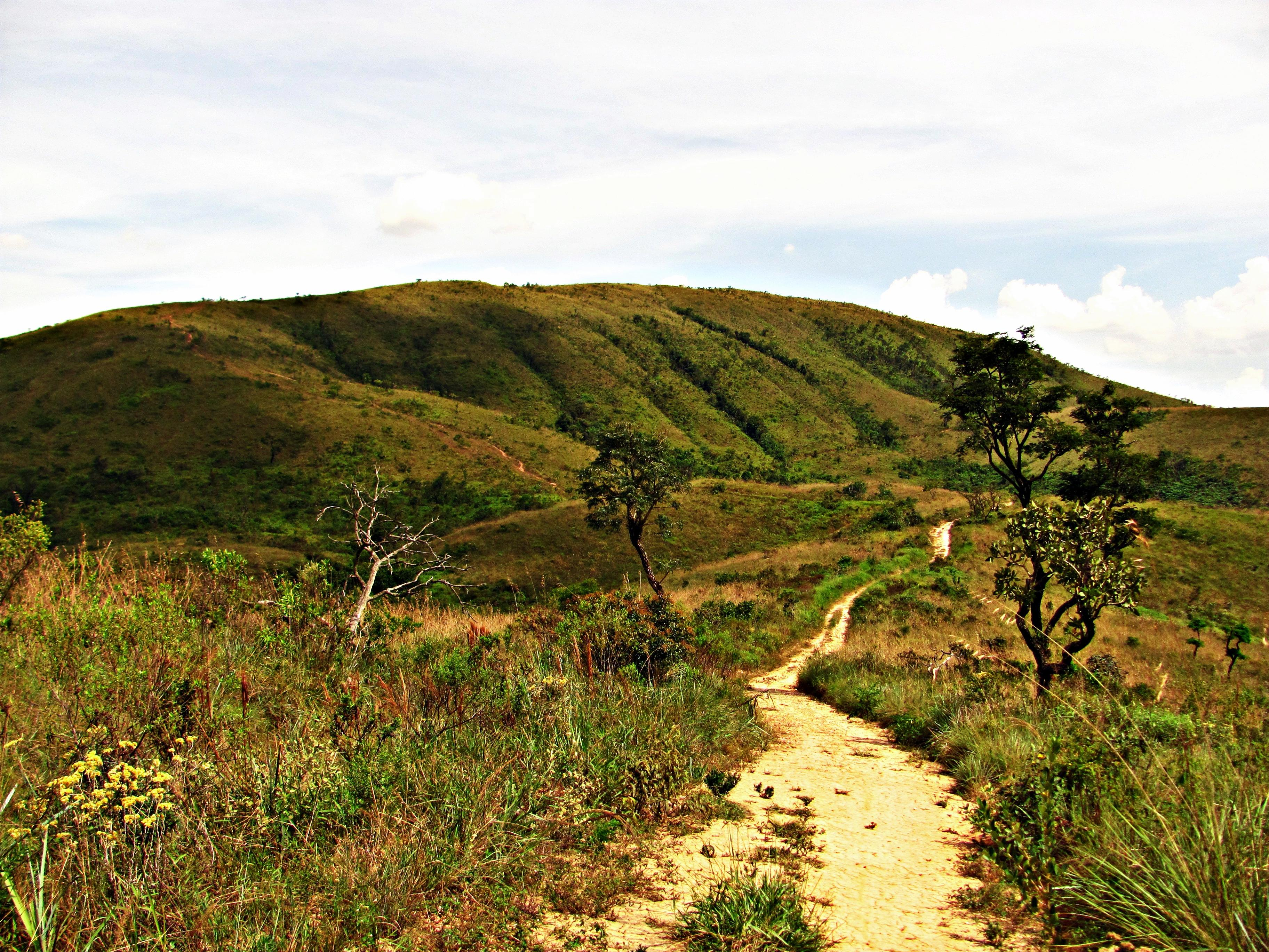 Parque Estadual do Juqueri, última reserva de cerrado na região metropolitana de São Paulo